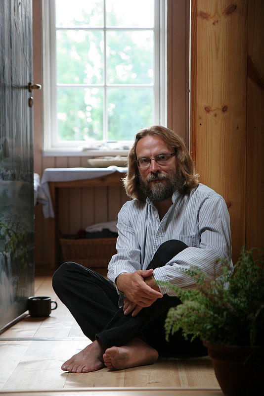 Teatrimees Margus Kasterpalu 2010. aastal Tartus, Kroonuaia tänaval.